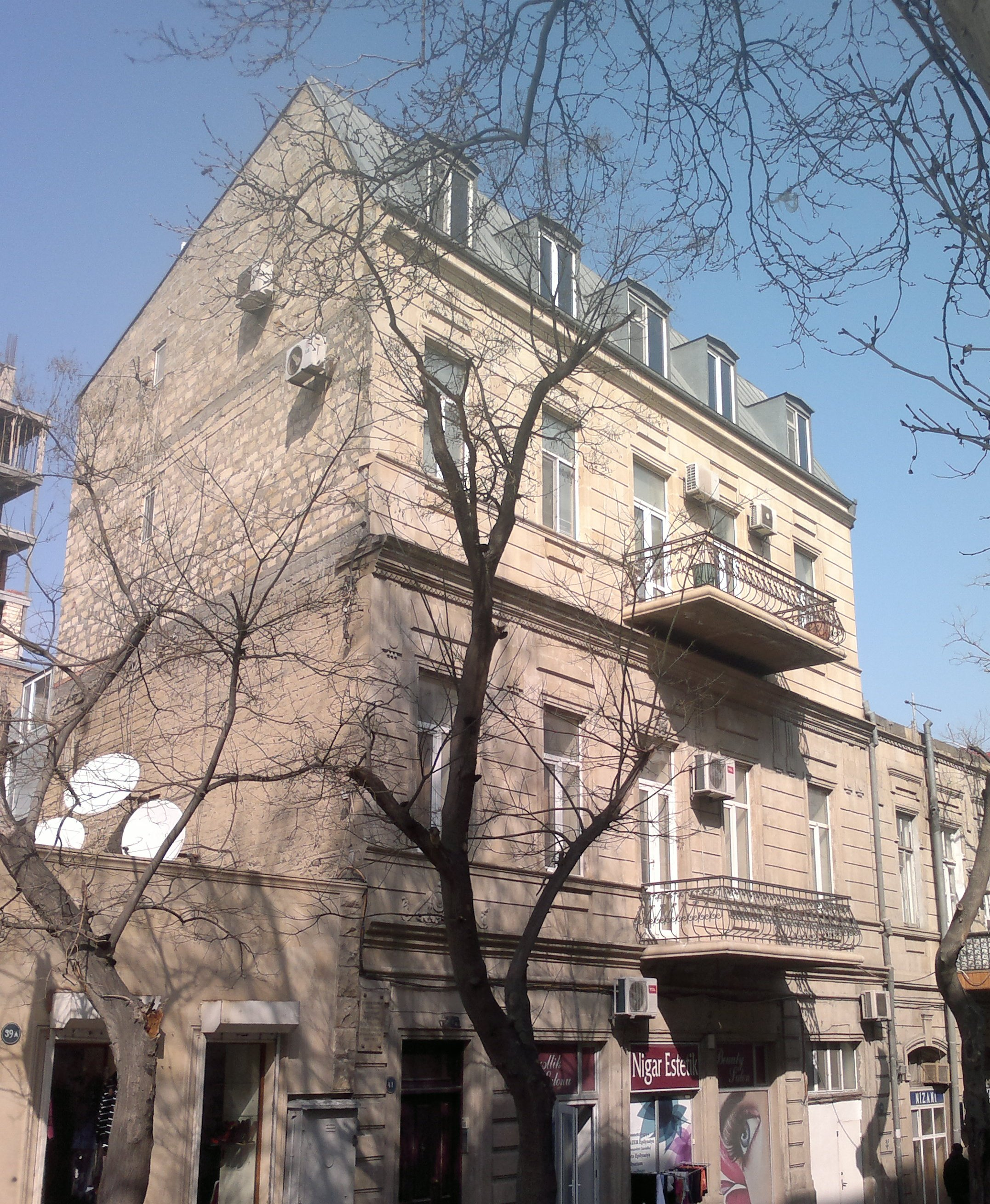 Building on Nizami Street 41